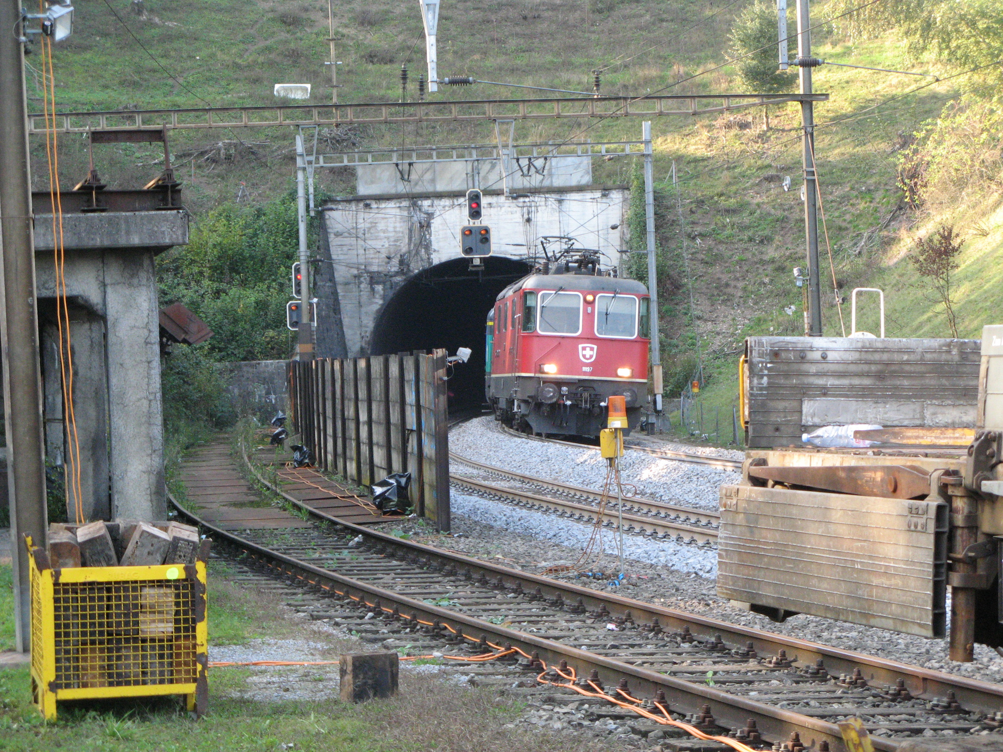 Südportal des Bözbergtunnels bei Schinznach-Dorf